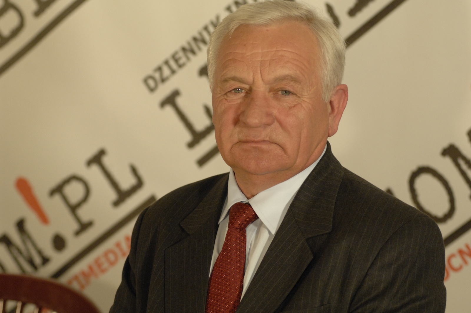 Zdzisław Podkański, polityk i urzędnik.